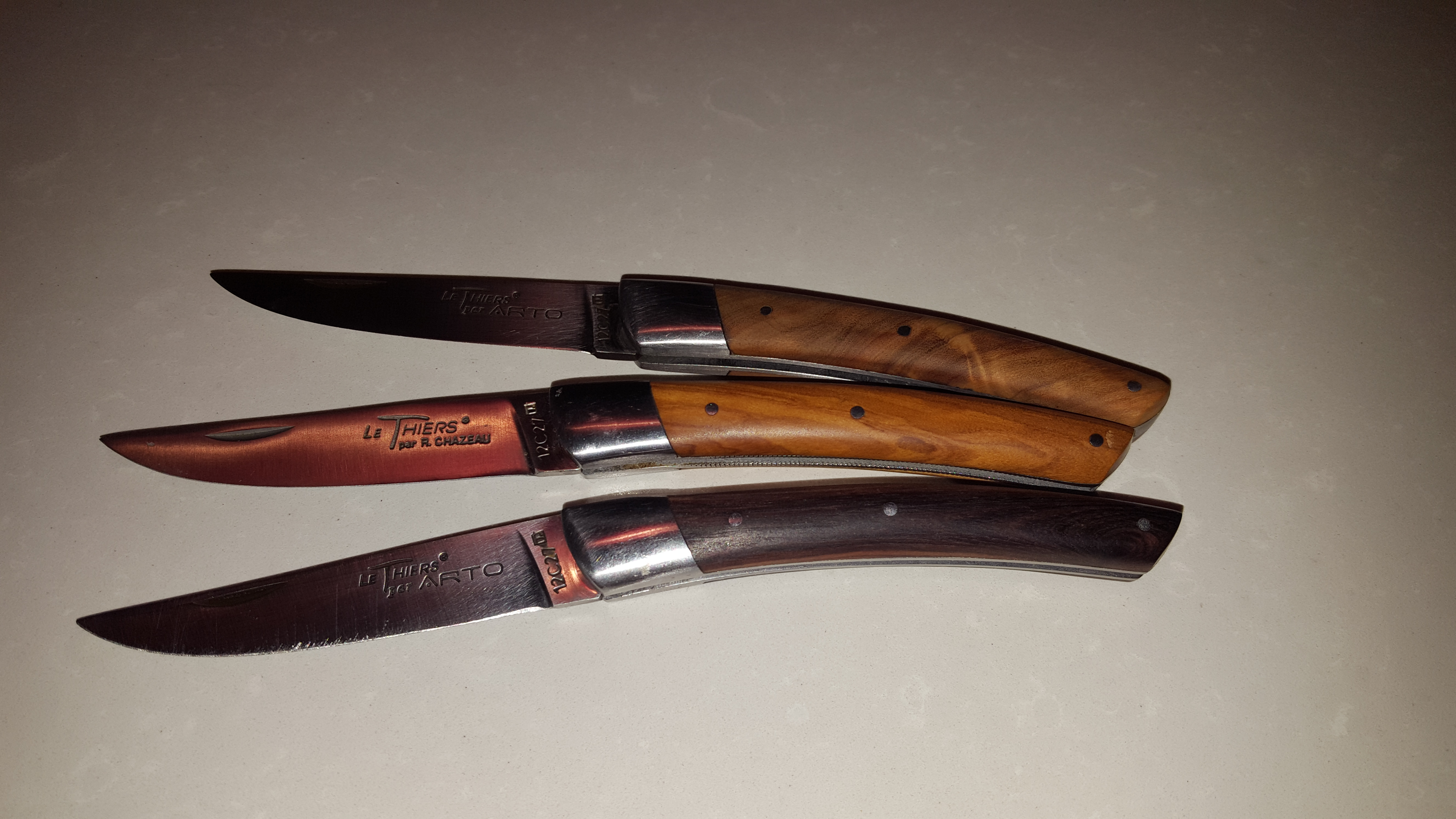 Couteau Le Thiers